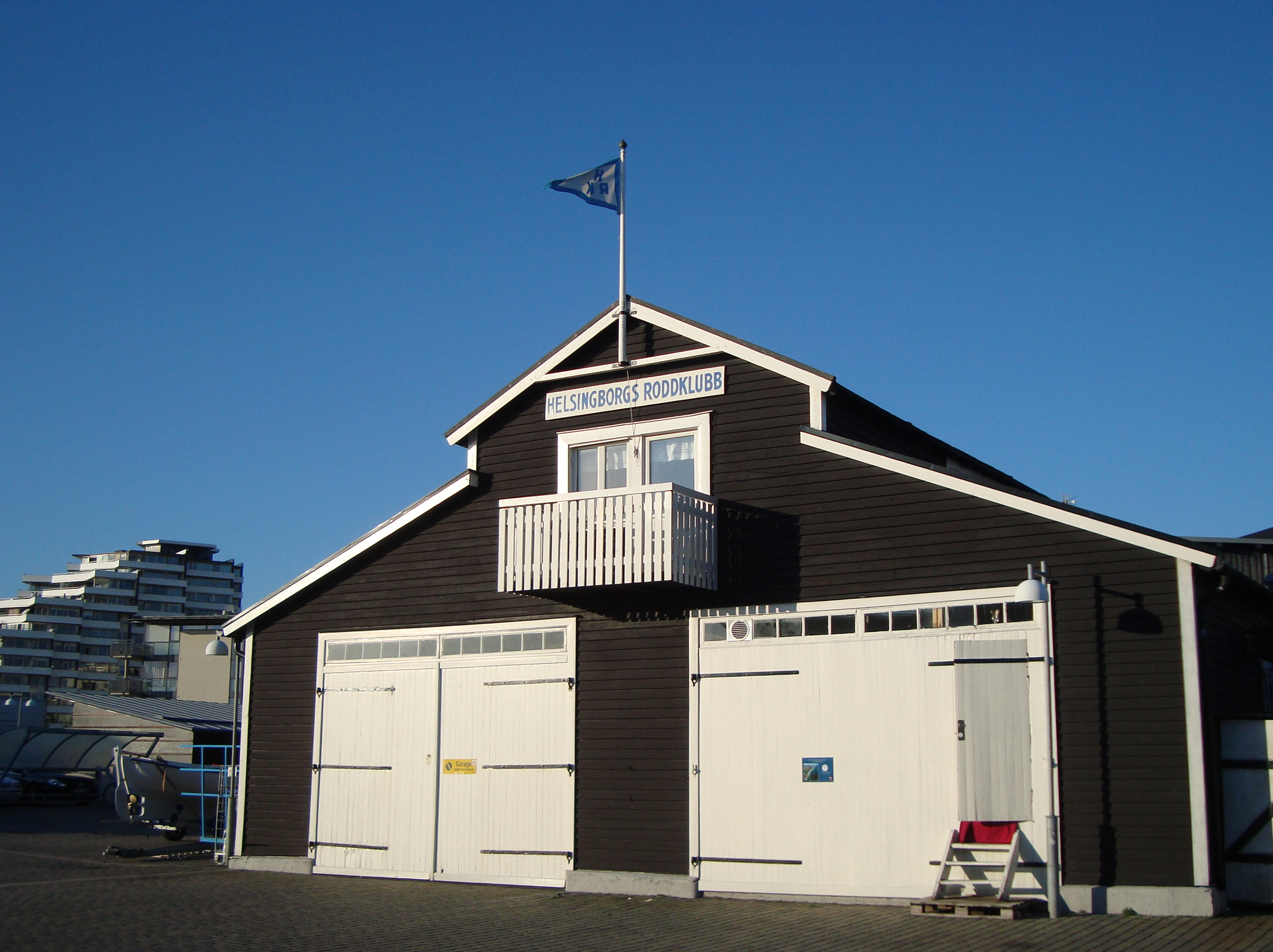 Helsingborgs roddhus klubbhus vid Norra hamnen.